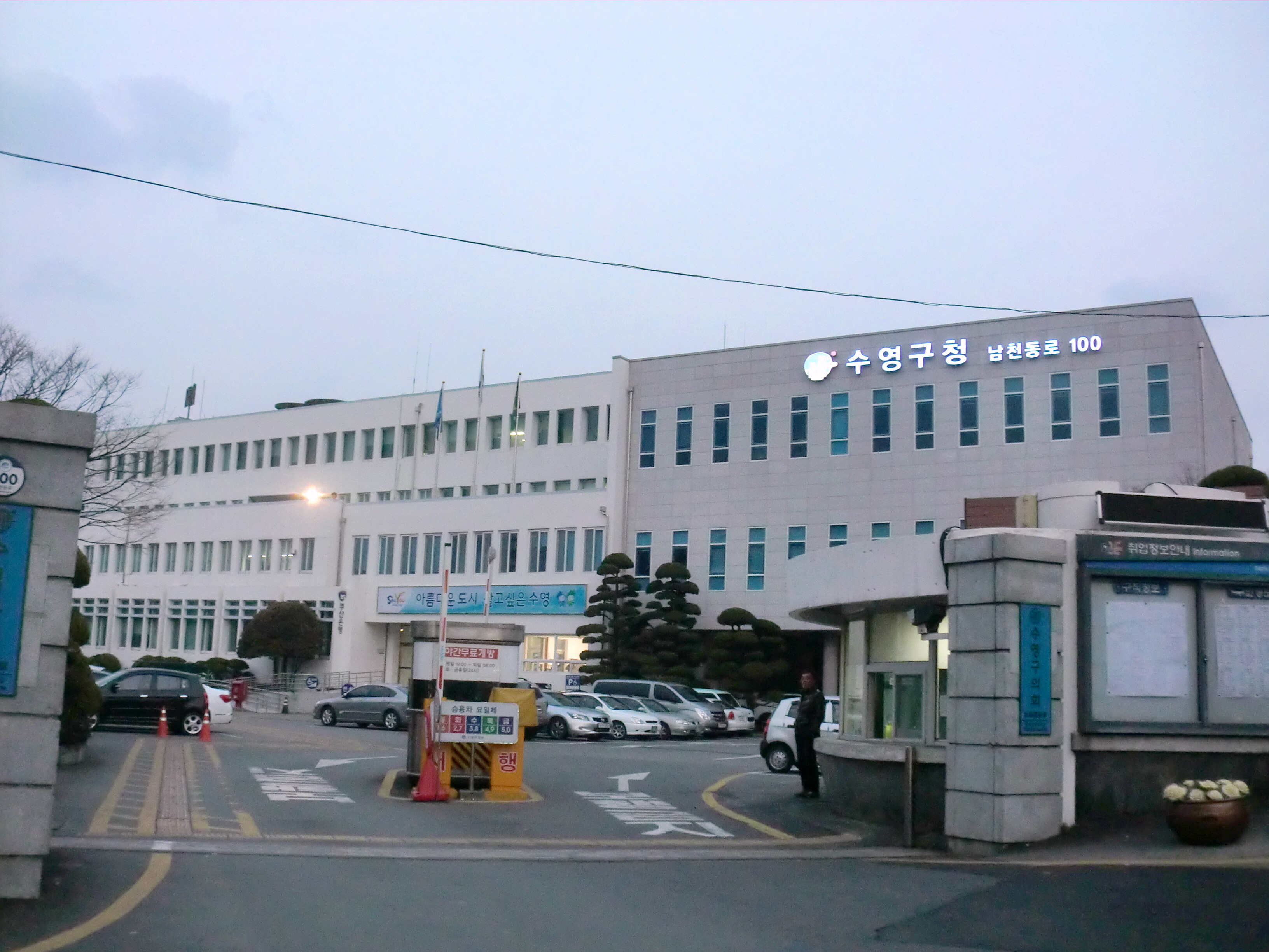 부산광역시 수영구에 있는 수영구청